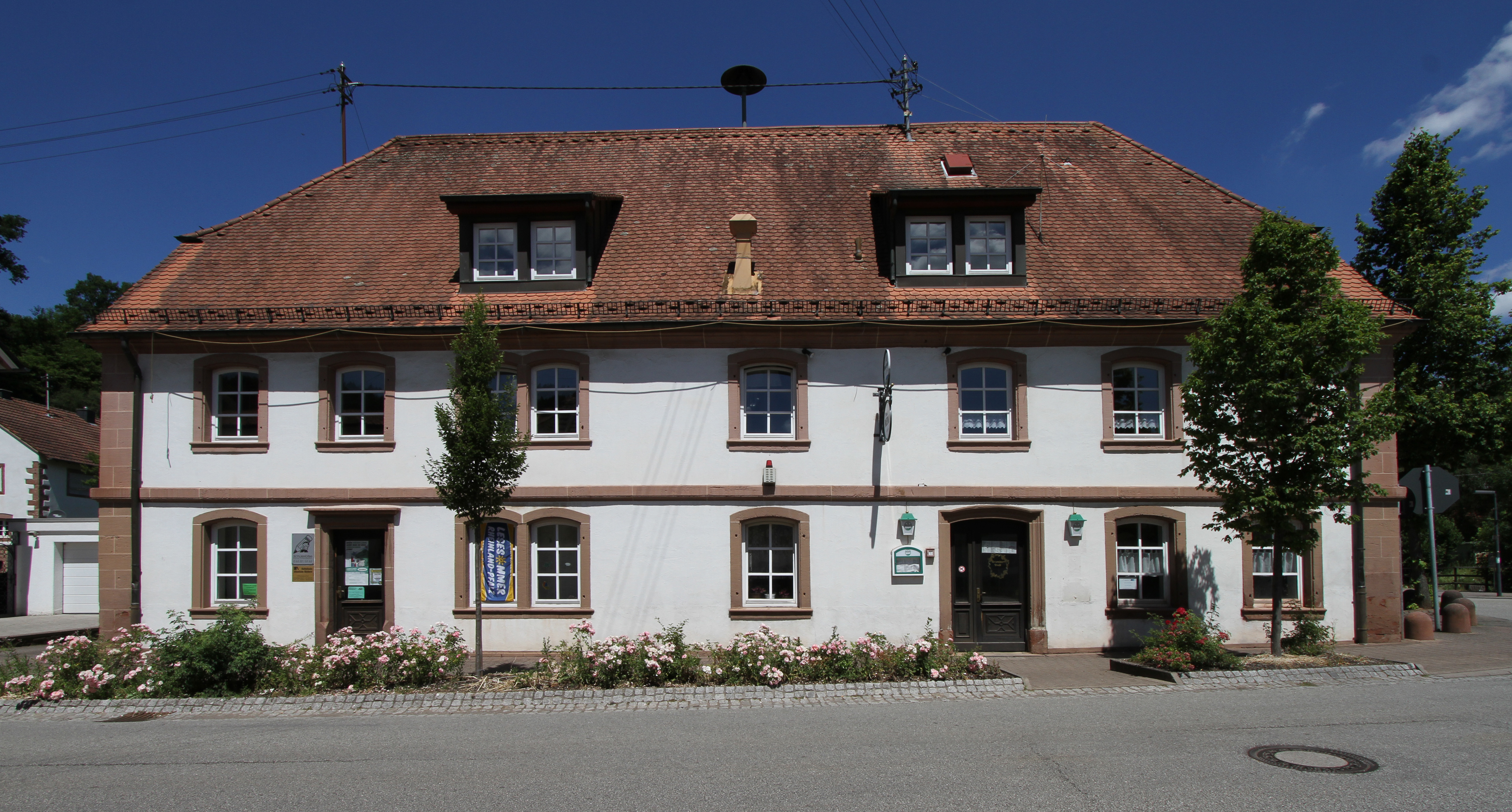 Wallhalben